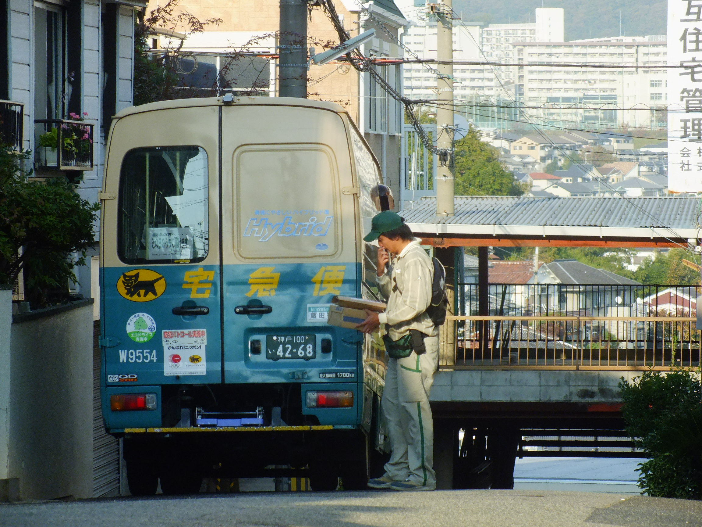 2013-11-16 Delivery car of YAMATO TRANSPORT CO., LTD.ヤマト運輸配達車と配達員